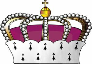 Herzogskrone - German Dukes Crown